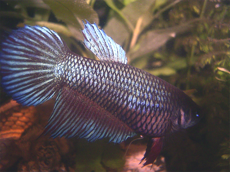 Kampffisch Weibchen (Betta splendens)